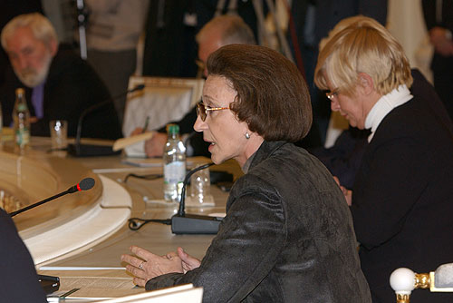 МОСКВА, КРЕМЛЬ. Советник Конституционного Суда, член Комиссии по правам человека Тамара Морщакова на встрече Президента с представителями правозащитных организаций и правоохранительных органов.